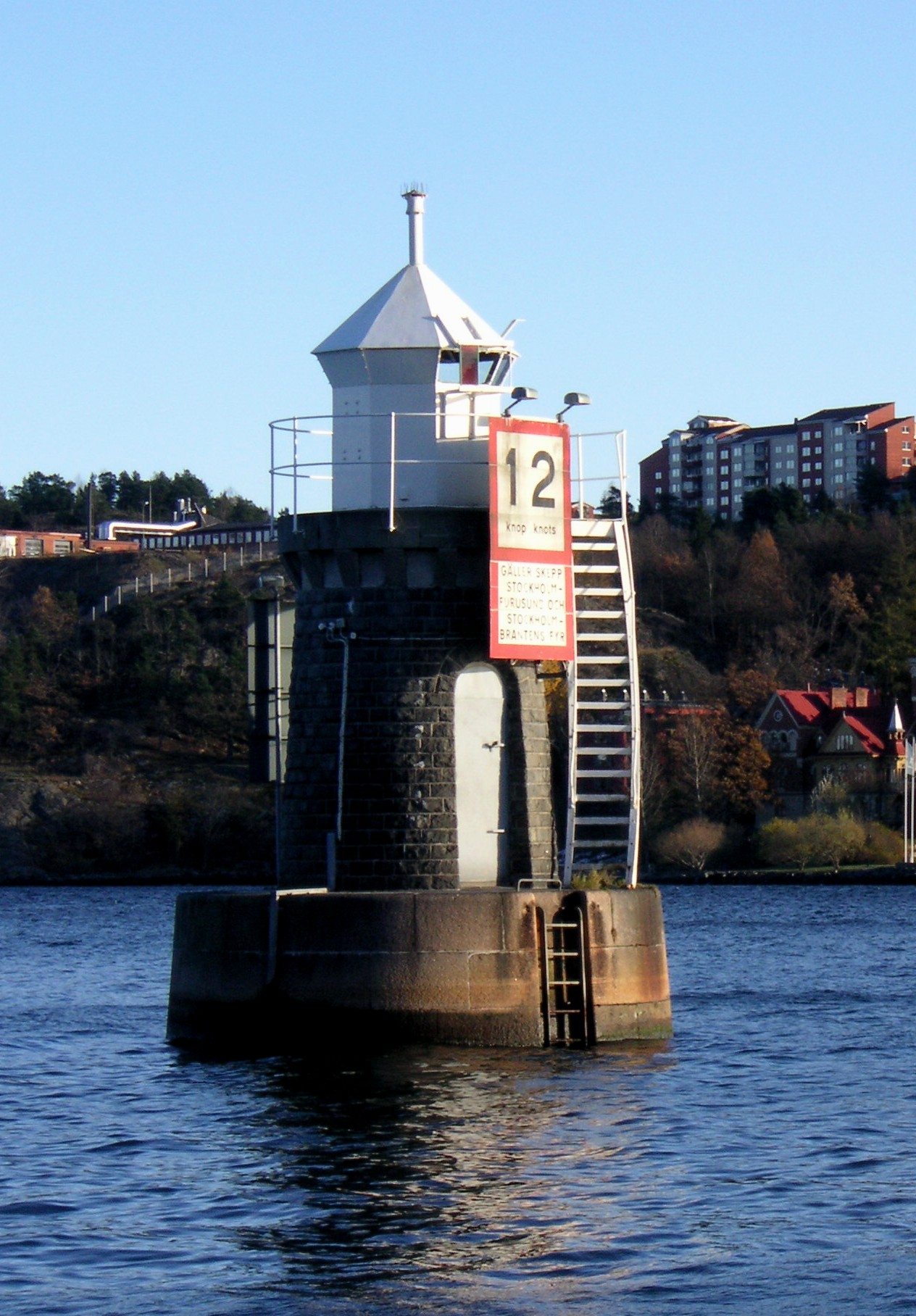 Gustav Daléns första fyr vid Blockhusudden i Stockholms inlopp